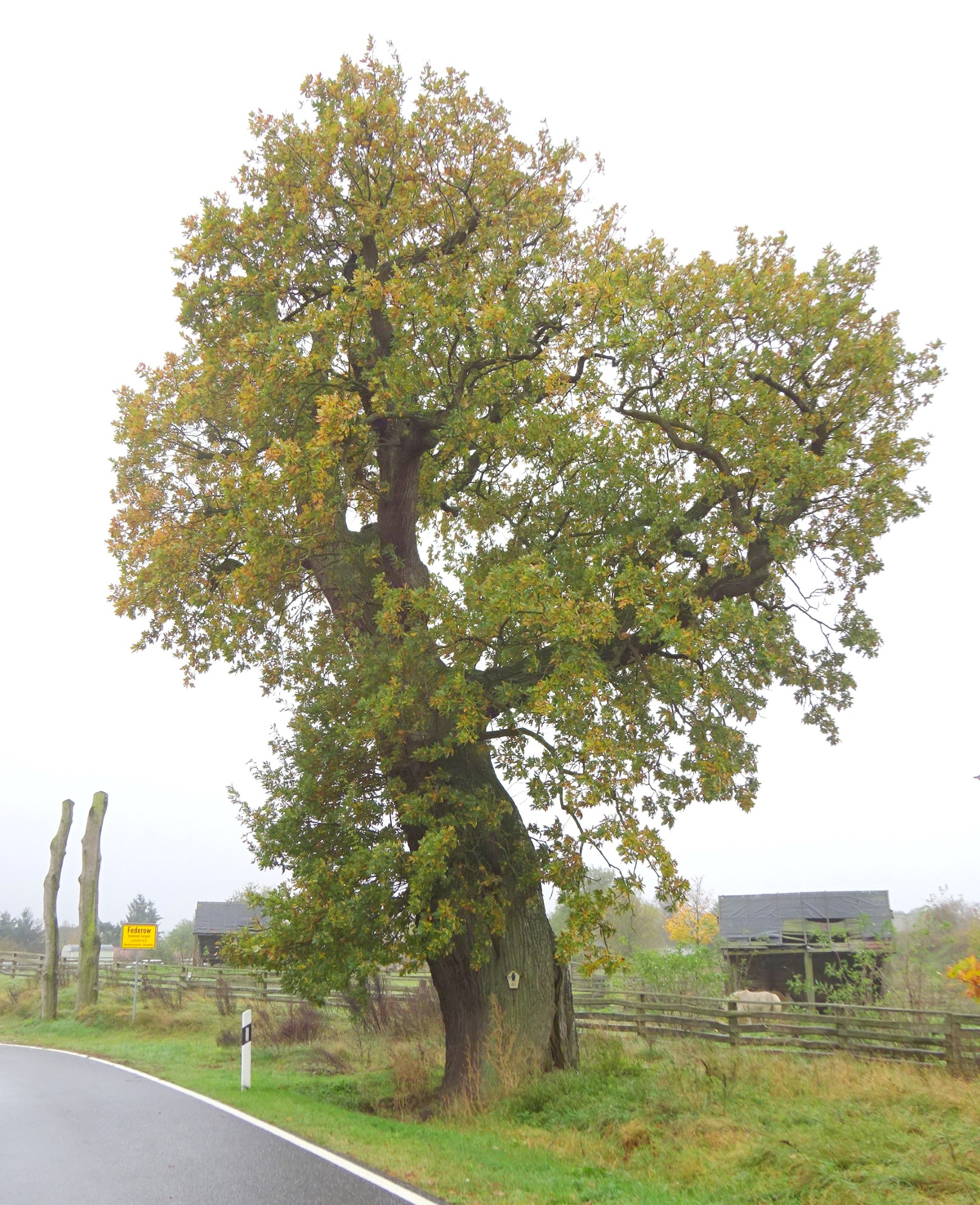 Eiche in Federow (17192 Kargow)